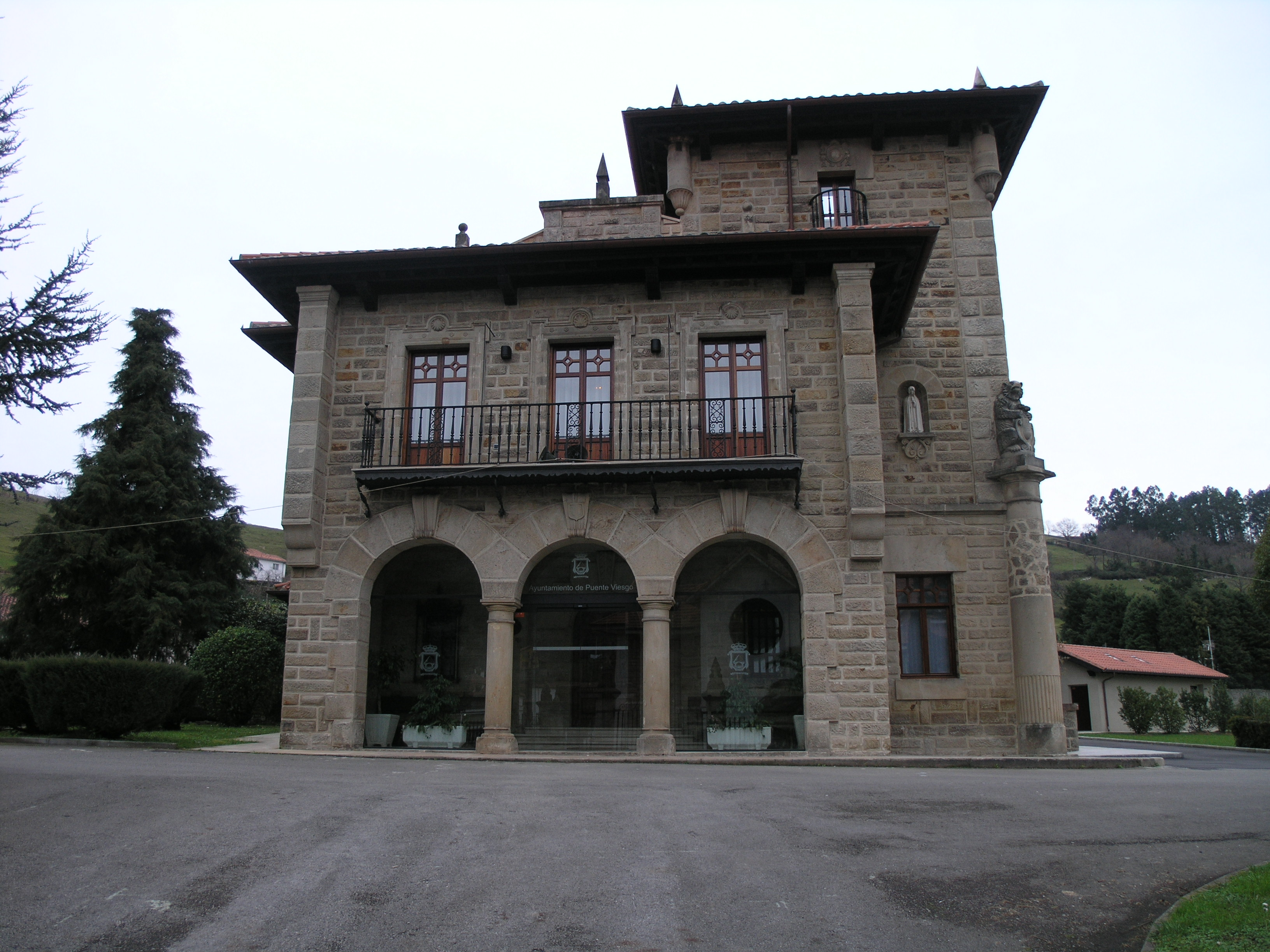 Casona de Fuentes-Pila, proyectada por el arquitecto Javier González de Riancho (1928). Actual Ayuntamiento de Puente Viesgo.